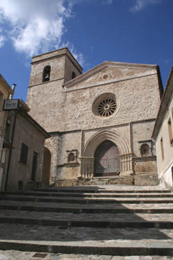 Timpano Gianfranco, opera prorpia, Chiesa Madre Zagarise